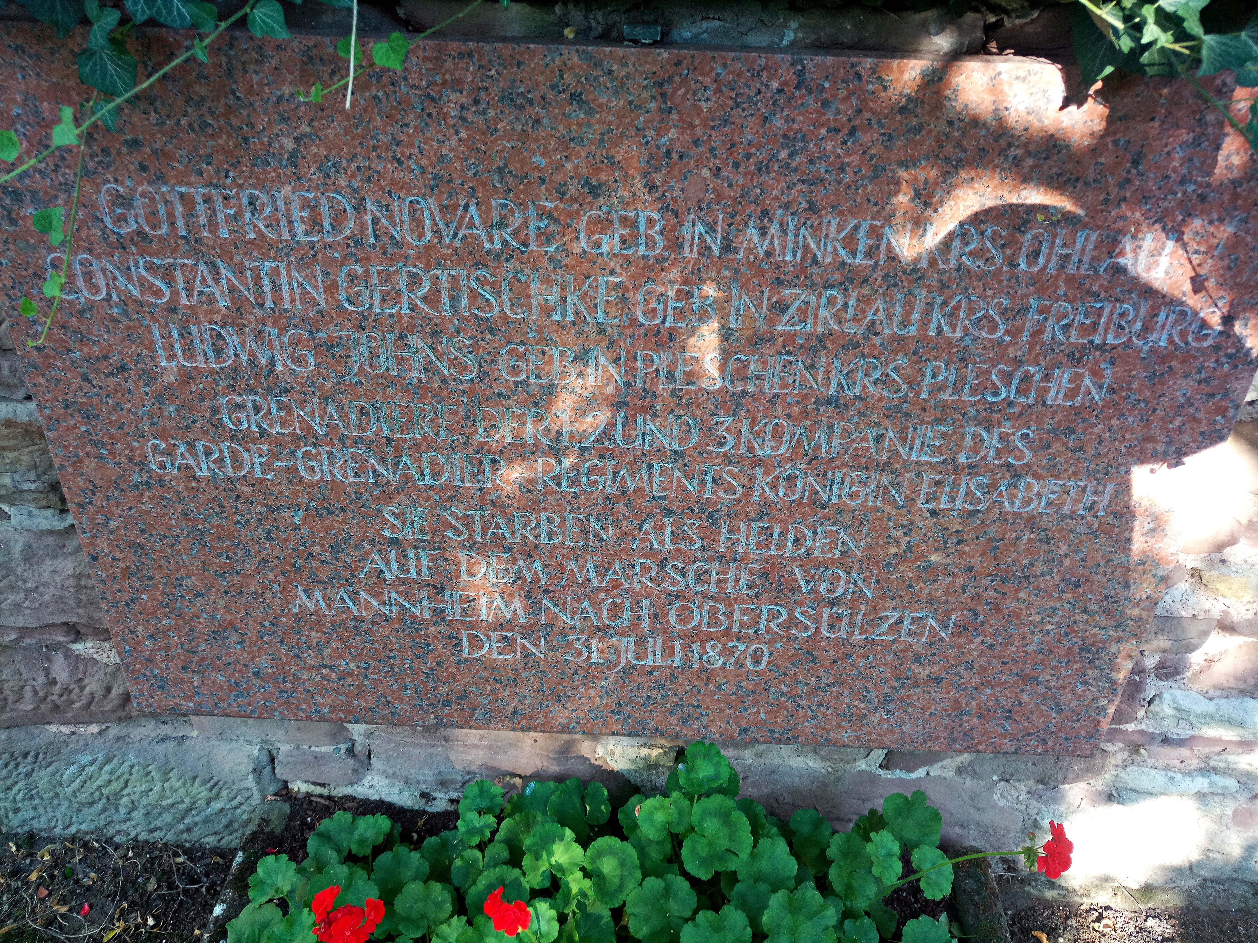 Obersülzen, Friedhof, Gedenktafel 1870